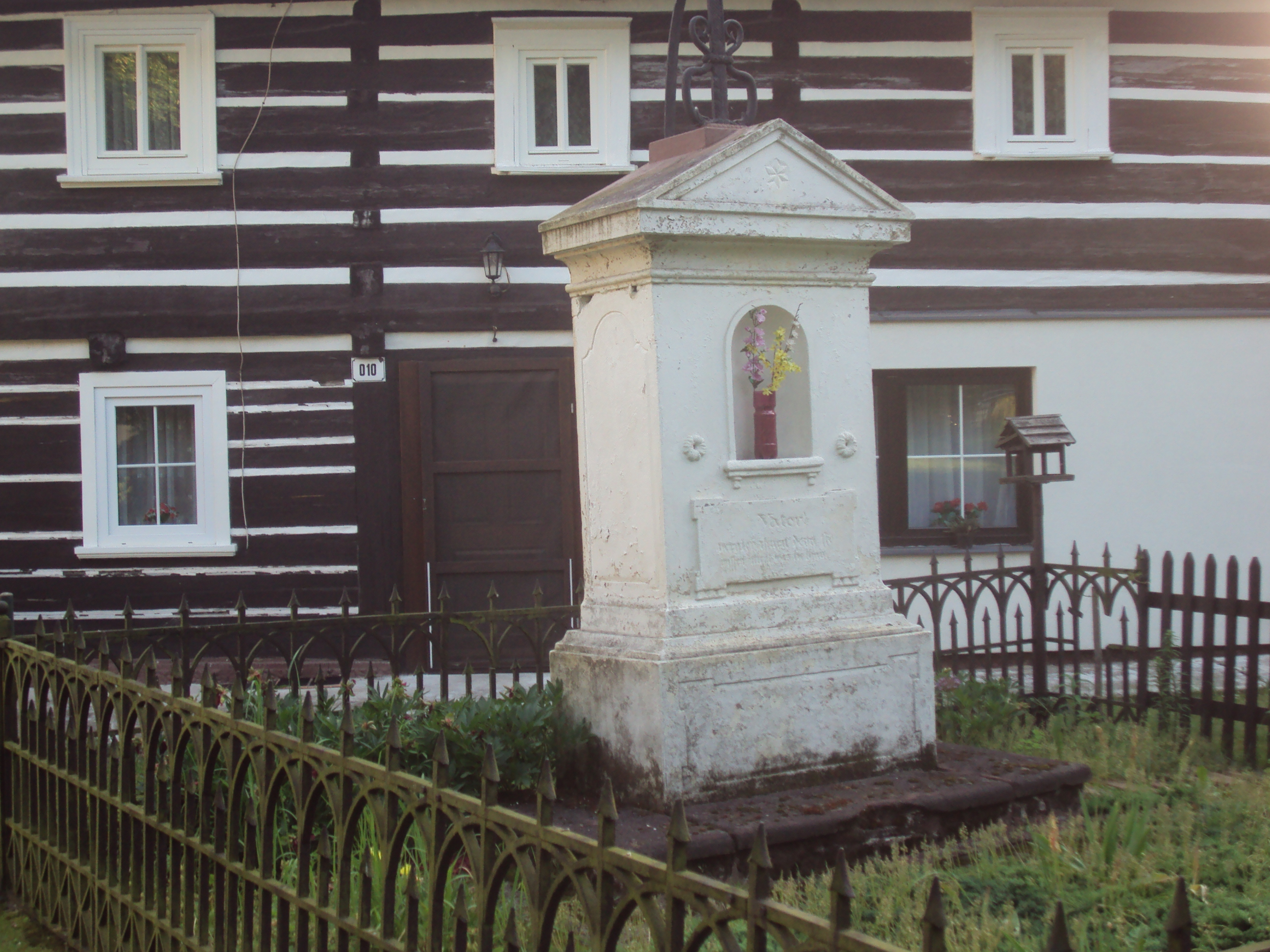 Kaplička na Mírovém náměstí v Zákupech, před stavením e.č.10